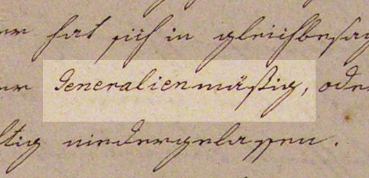 Slovo Generalienmäßig napsáno částečně humanistickým (latinský základ slova Generalien) a částečně novogotickým písmem (německá koncovka mäßig), text z roku 1795 pocházející z kanceláře olomouckého arcibiskupa